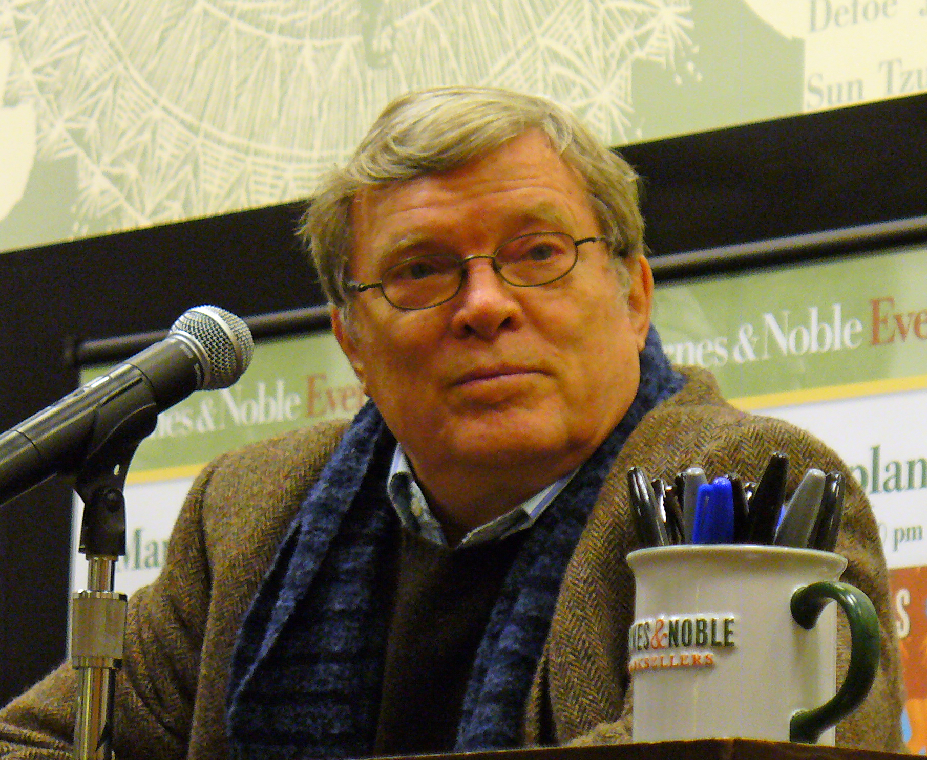 D. A. Pennebaker by David Shankbone